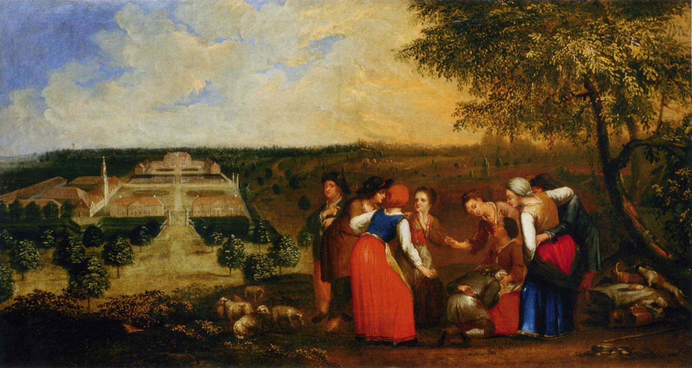 Ansicht von Schloss Schlobitten mit Vorwerk. Supraporte aus dem Schloss.